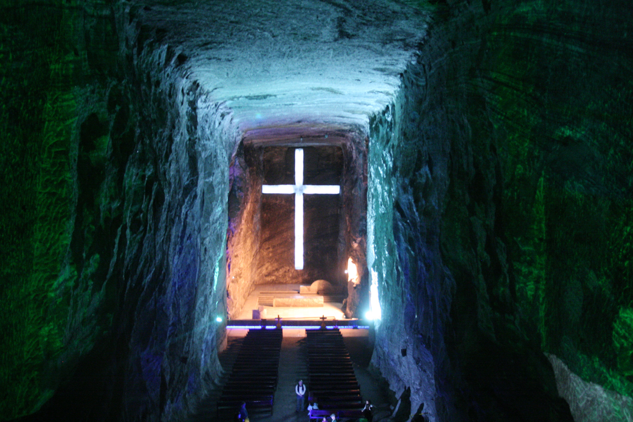 Catedral de Sal de Zipaquira (Colombie)